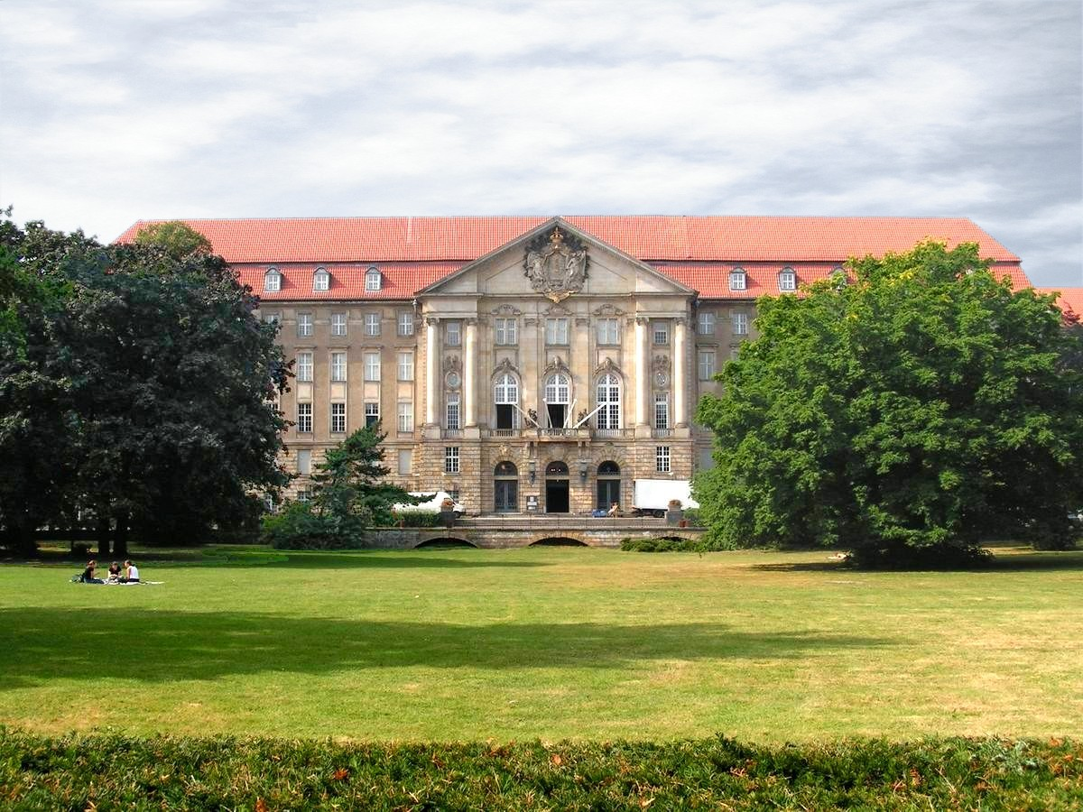 Kammergericht in Berlin-Schöneberg Fotografiert von Dieter Brügmann am 10.9.2005.